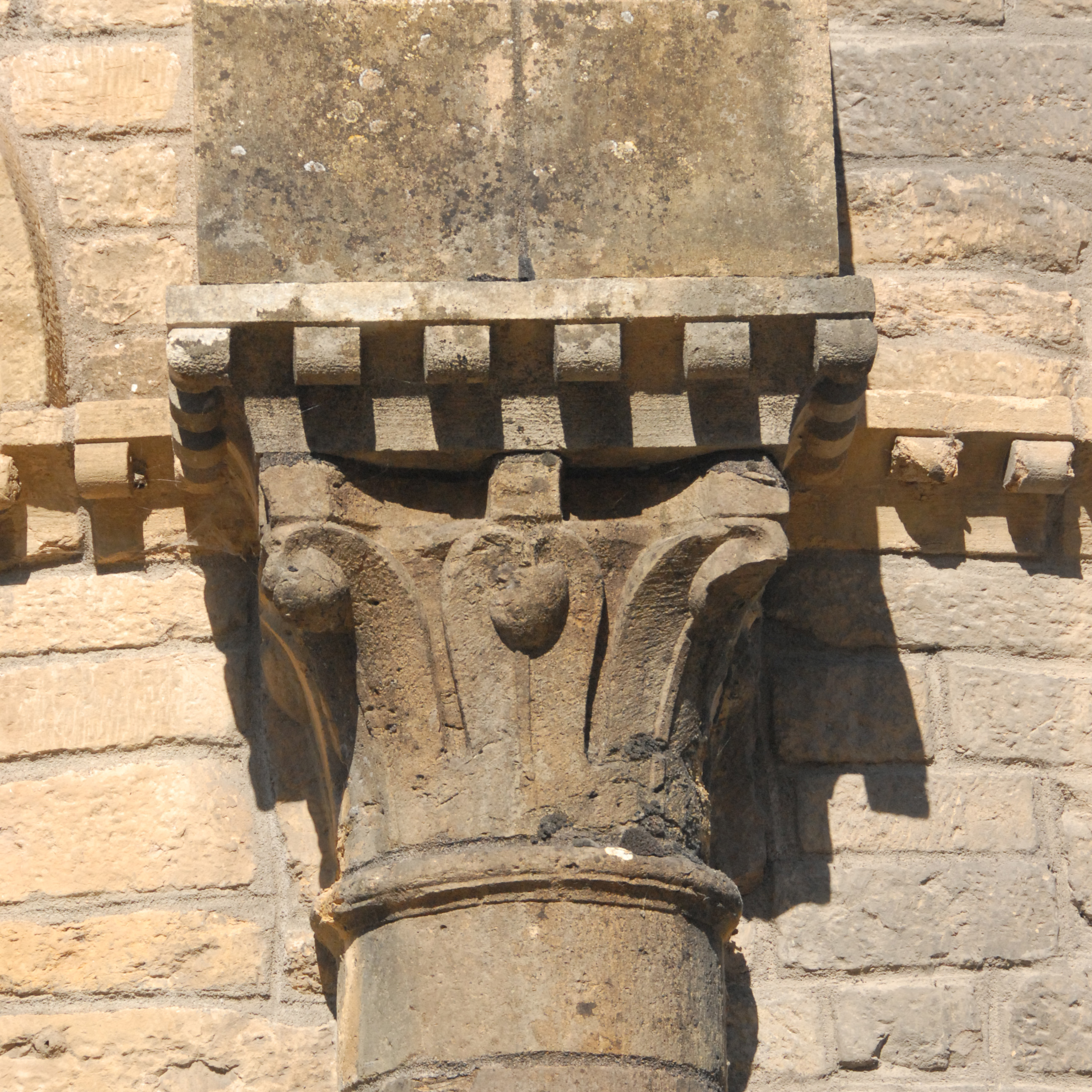 Kapitell Kranzkapelle